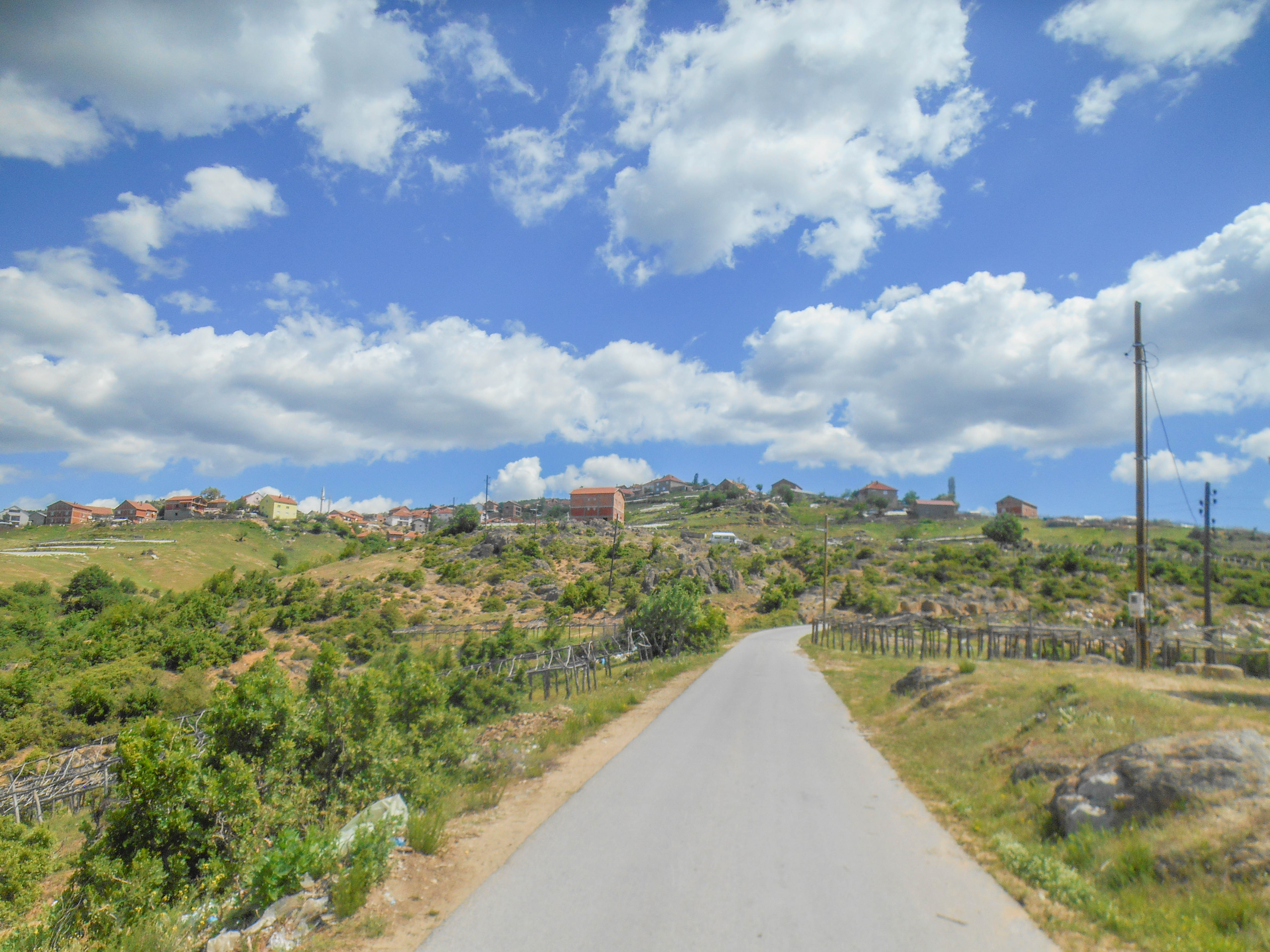 Висока Маала